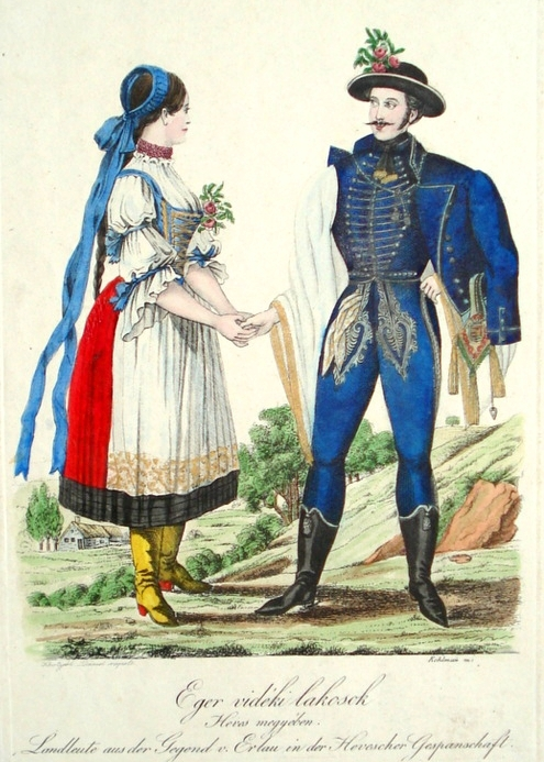 Eger vidéki lakosok népviselete